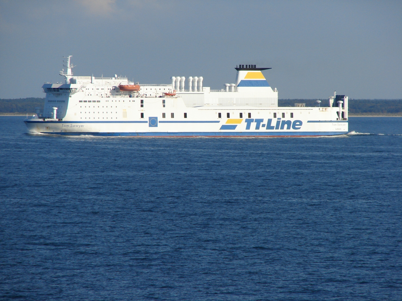 Tom Sawyer der TT-Line bei der Ausfahrt aus Rostock